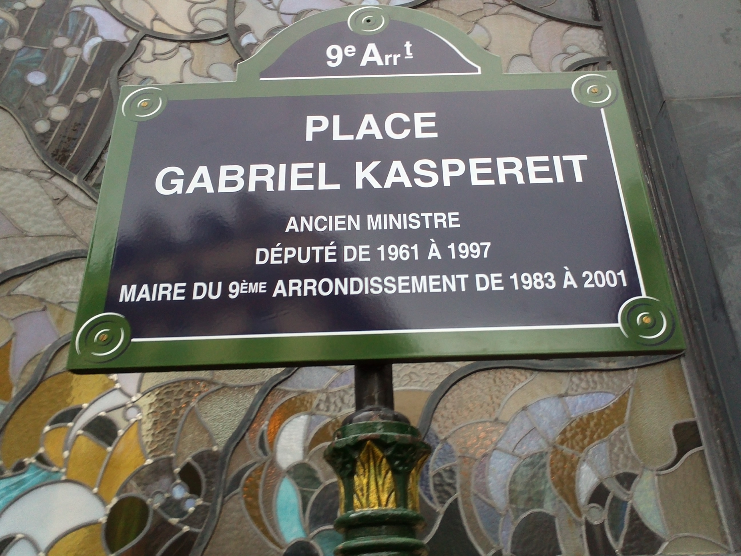 Place Gabriel Kaspéreit à Paris